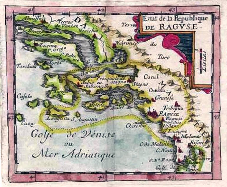 Carte de la République de Raguse